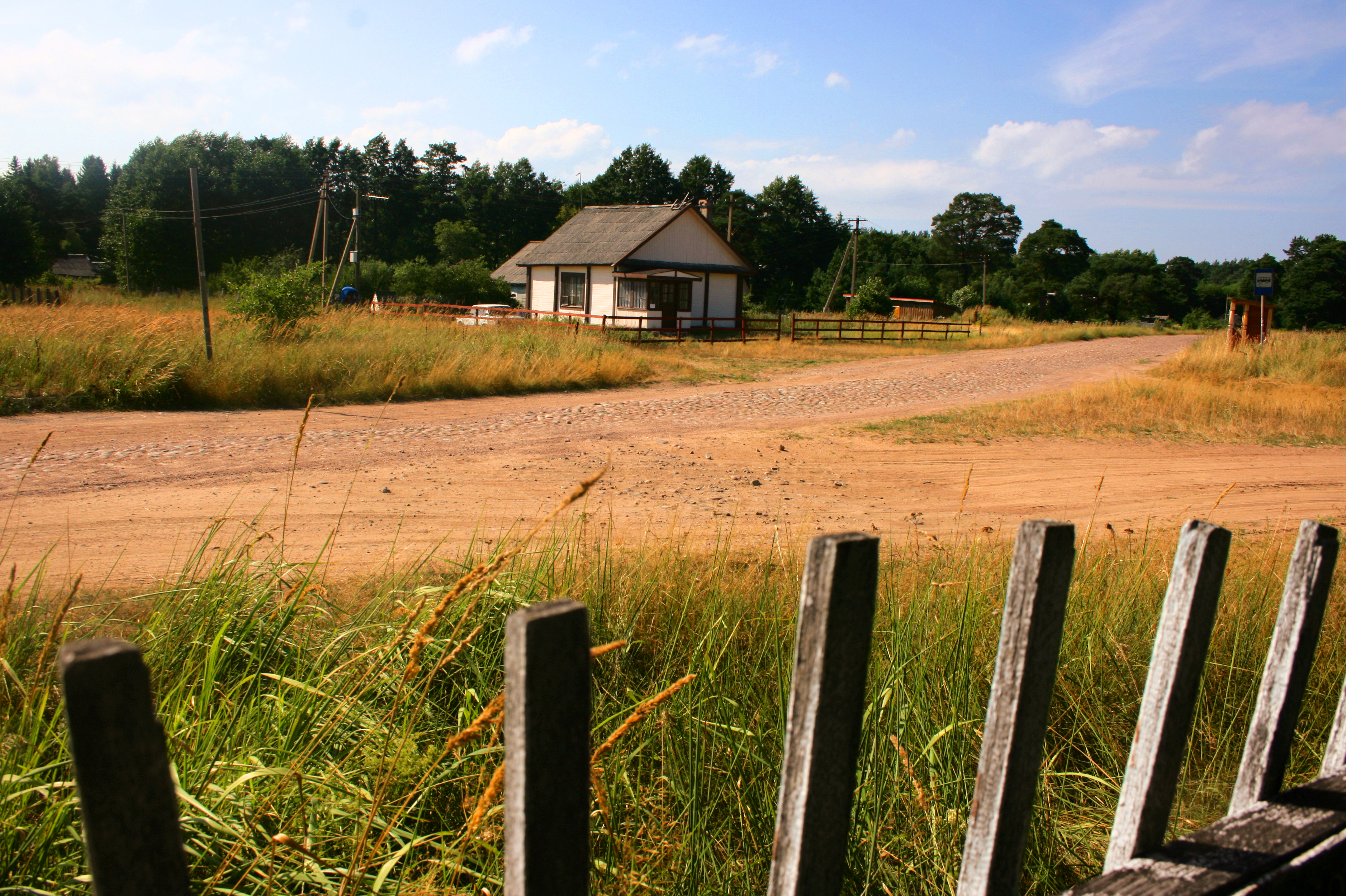 Конново 2010